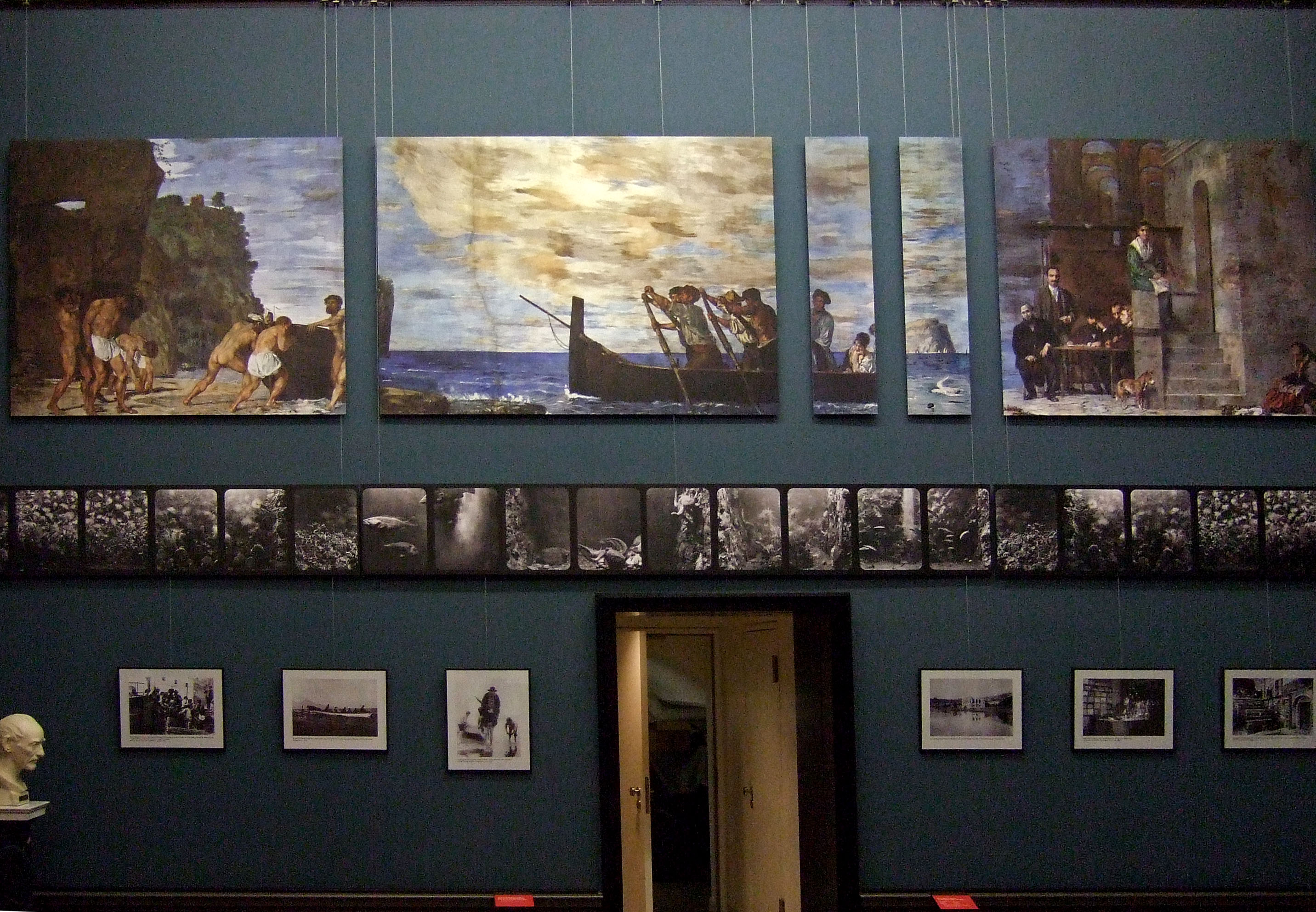 Rekonstruktion der Fresken im Aquarium Neapels, in der Alten Nationalgalerie Berlin.